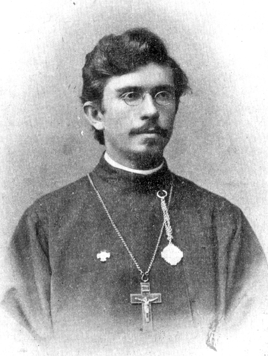 hieromartyr Alexander_Hotovitsky